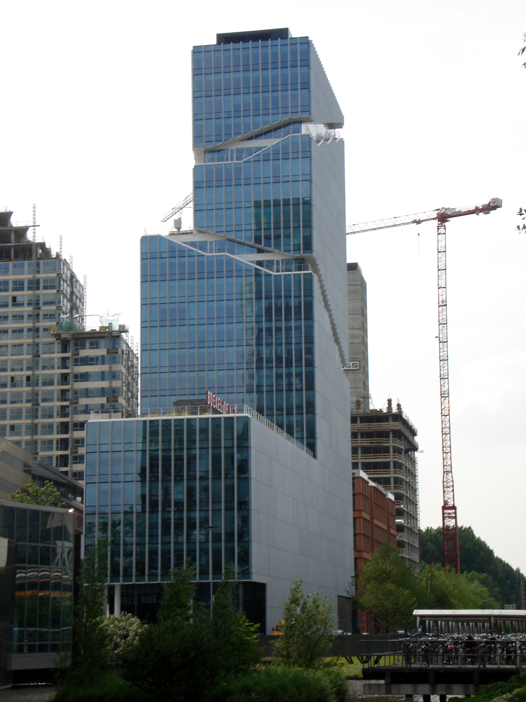 Viñoly, Zuidas, Amsterdam, the Netherlands.